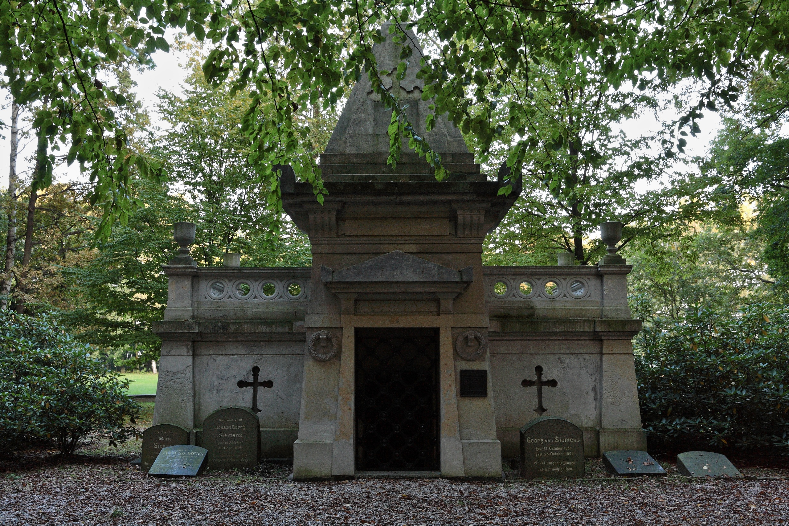 Die Gruft derer von Siemens im Schlosspark Ahlsdorf